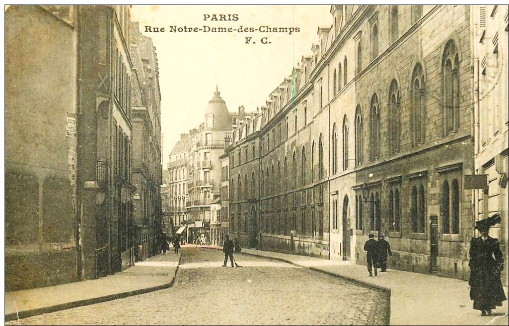 Carte postale ancienne. La rue Notre-Dame-des-Champs, au fond le carrefour avec la rue Vavin. Le bâtiment sur la droite a été détruit pour laisser place à des immeubles d'habitation et aux nouveaux bâtiments du collège et lycée Notre-Dame-de-Sion.